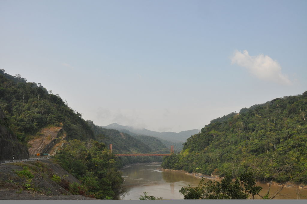 Aldo Santos